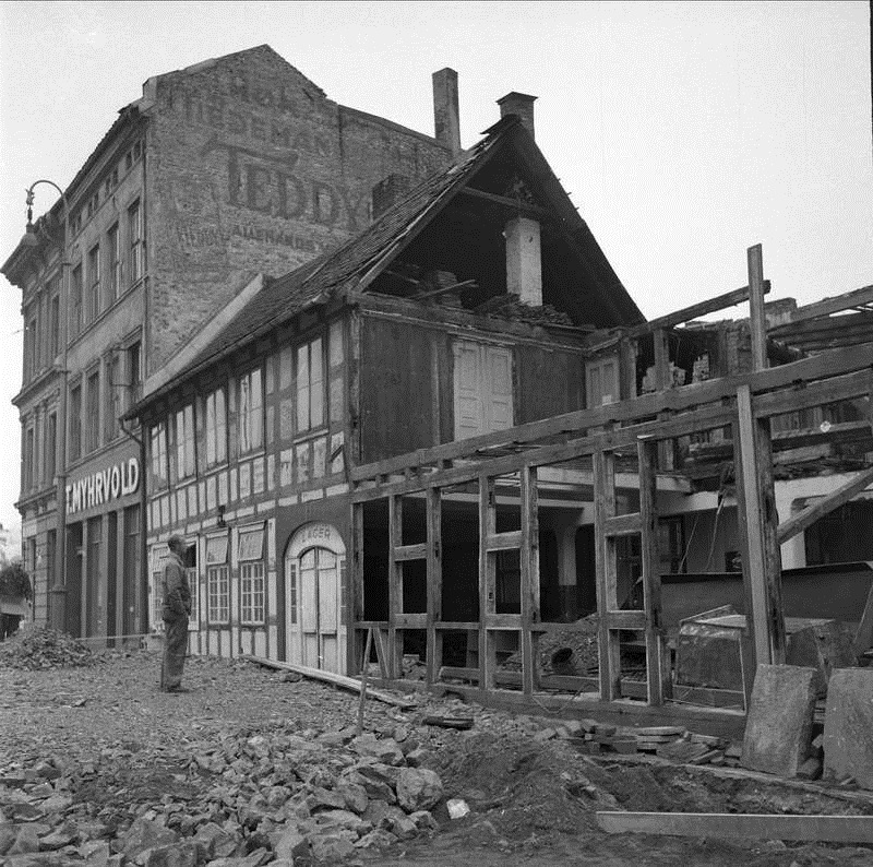 Oslo, juli 1956. Anleggsarbeid. Bindingsverksbygning i Rødfyllgata 12 under riving, nå på Norsk Folkemuseum. Fra Dagbladets negativarkiv (6 x 6) som Norsk Folkemuseum overtok 2003.